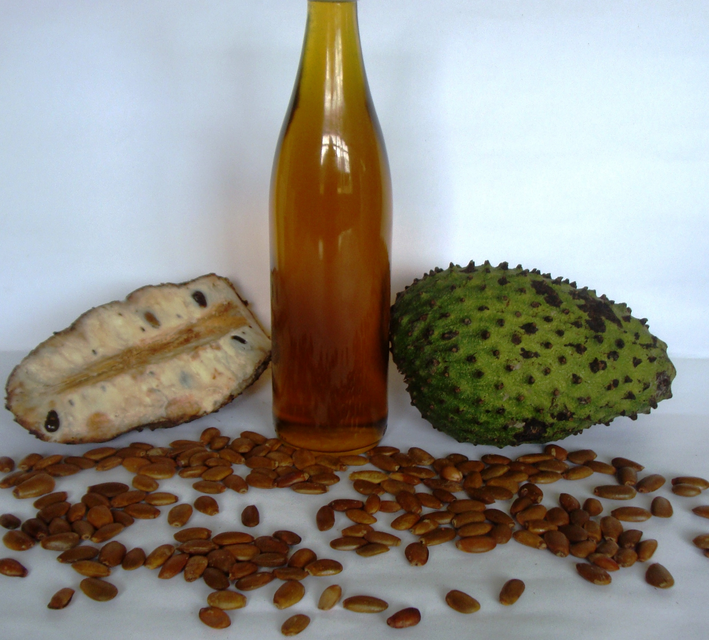 Óleo virgem de graviola